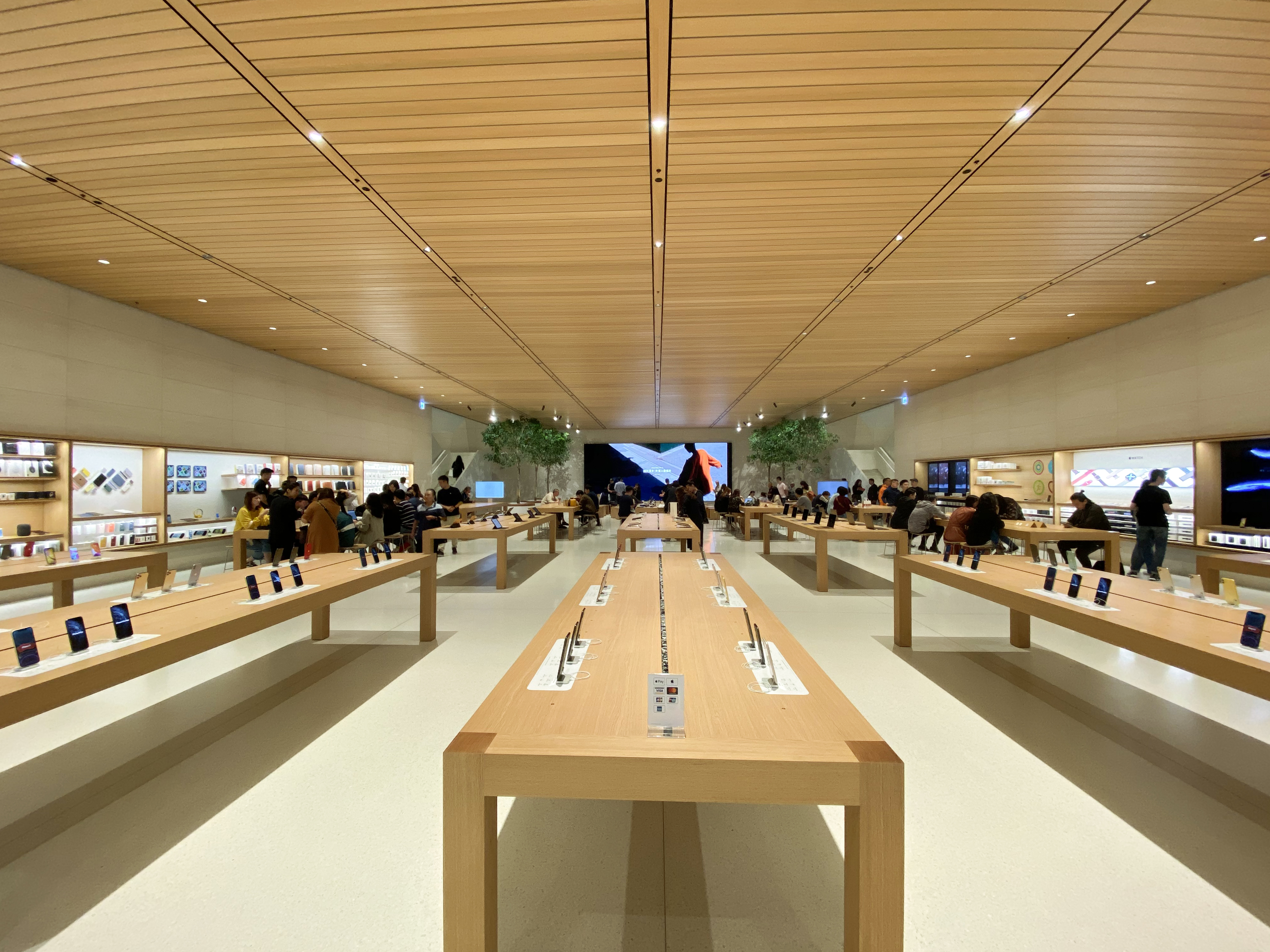 Apple Taipei Xinyi A13